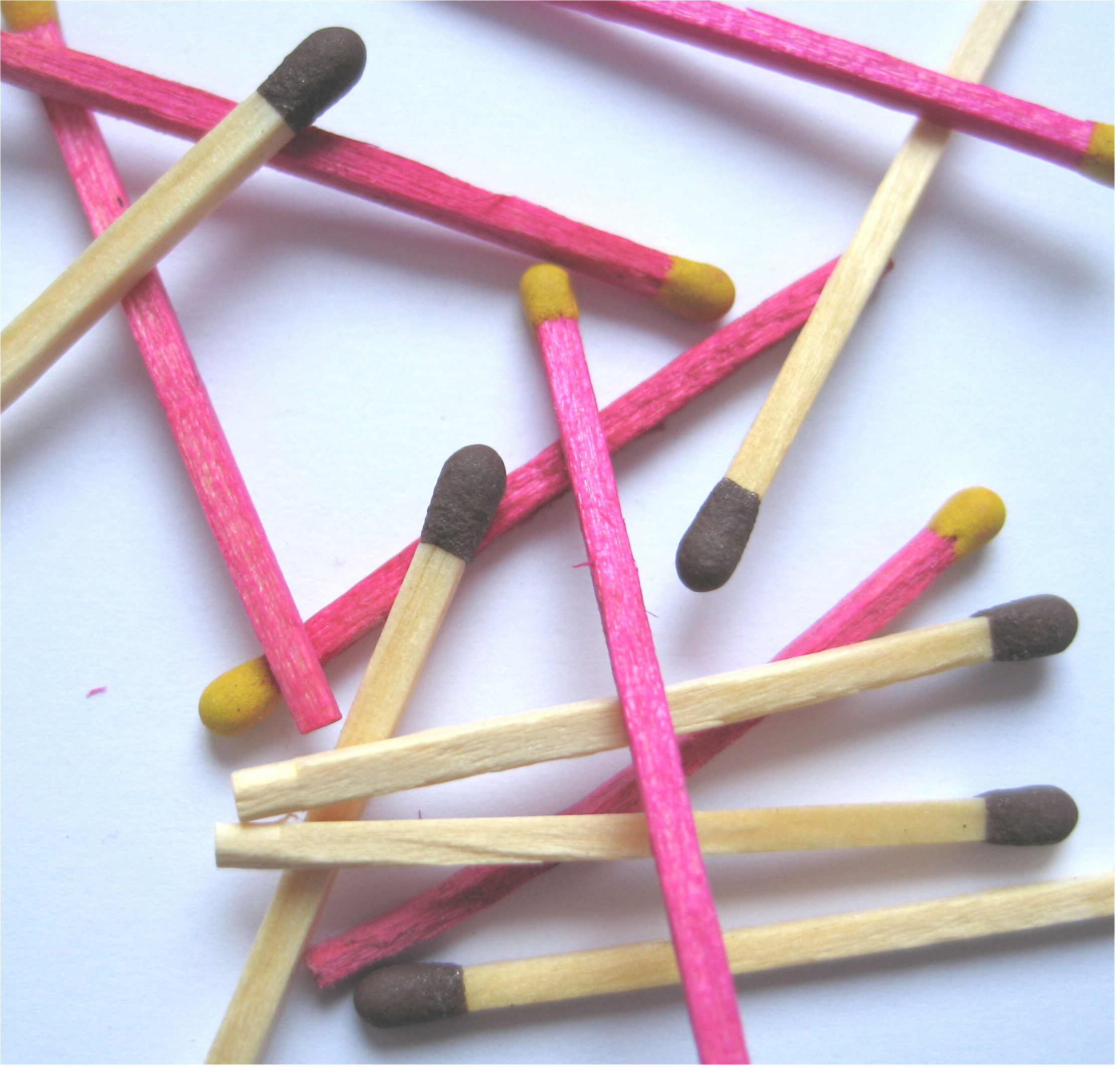 Fixspéin